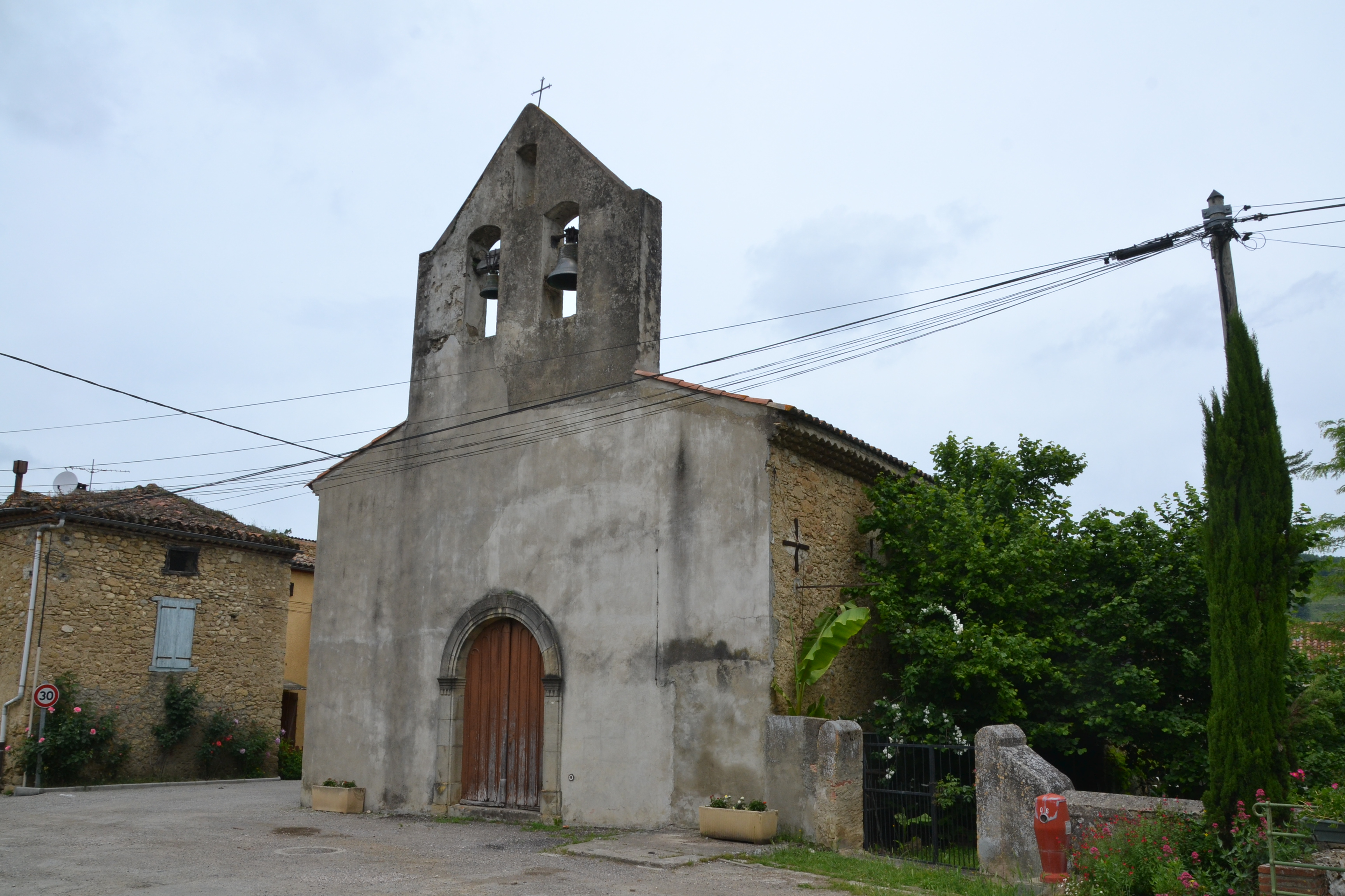 L'église d'Engraviès, commune de Dun (Ariège, France).